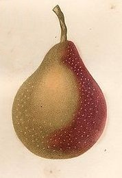 Poire Martin Sec-St Hilaire-+1845